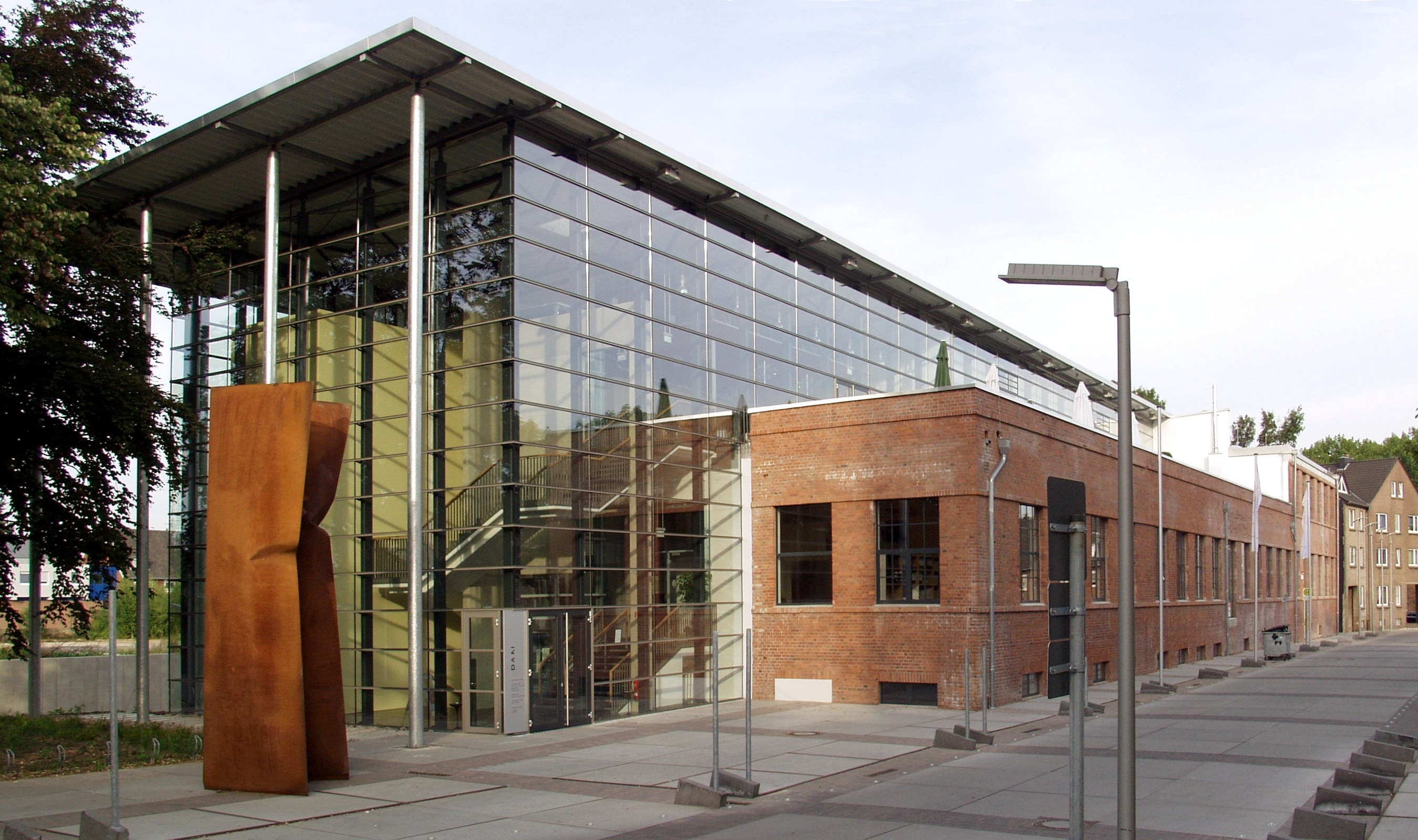 PAN-Kunstforum (Plakatmuseum) in Emmerich am Rhein. Bildhauer der Skulptur vorne links: Thomas Kühnapfel.